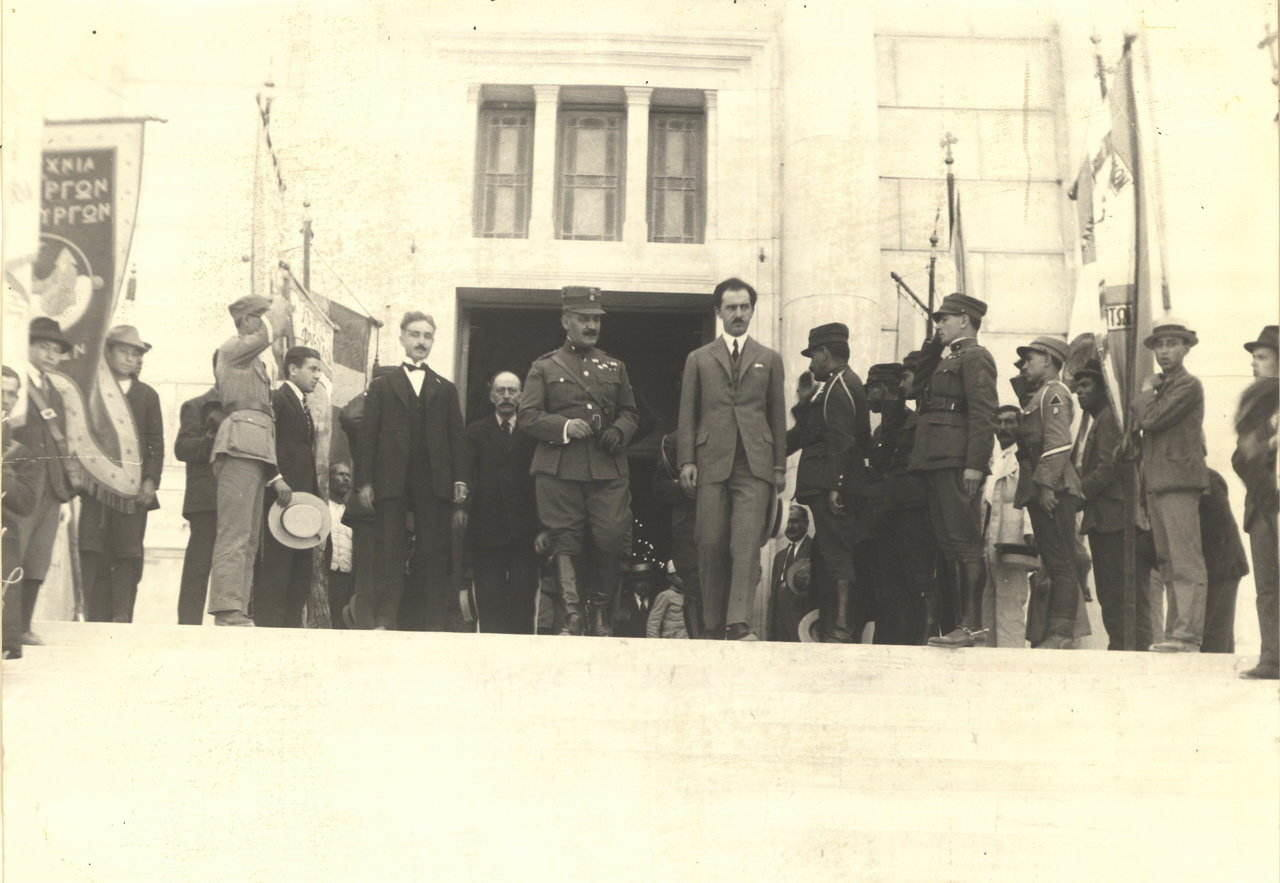 1923: Ο Πρωθυπουργός Στυλιανός Γονατάς με τον πολιτικό σύμβουλο της επανάστασης και υπουργό εσωτερικών, Γεώργιο Παπανδρέου, σε δοξολογία.